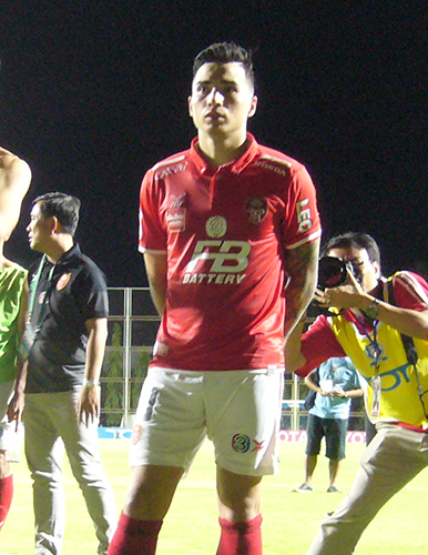 Tristan Do